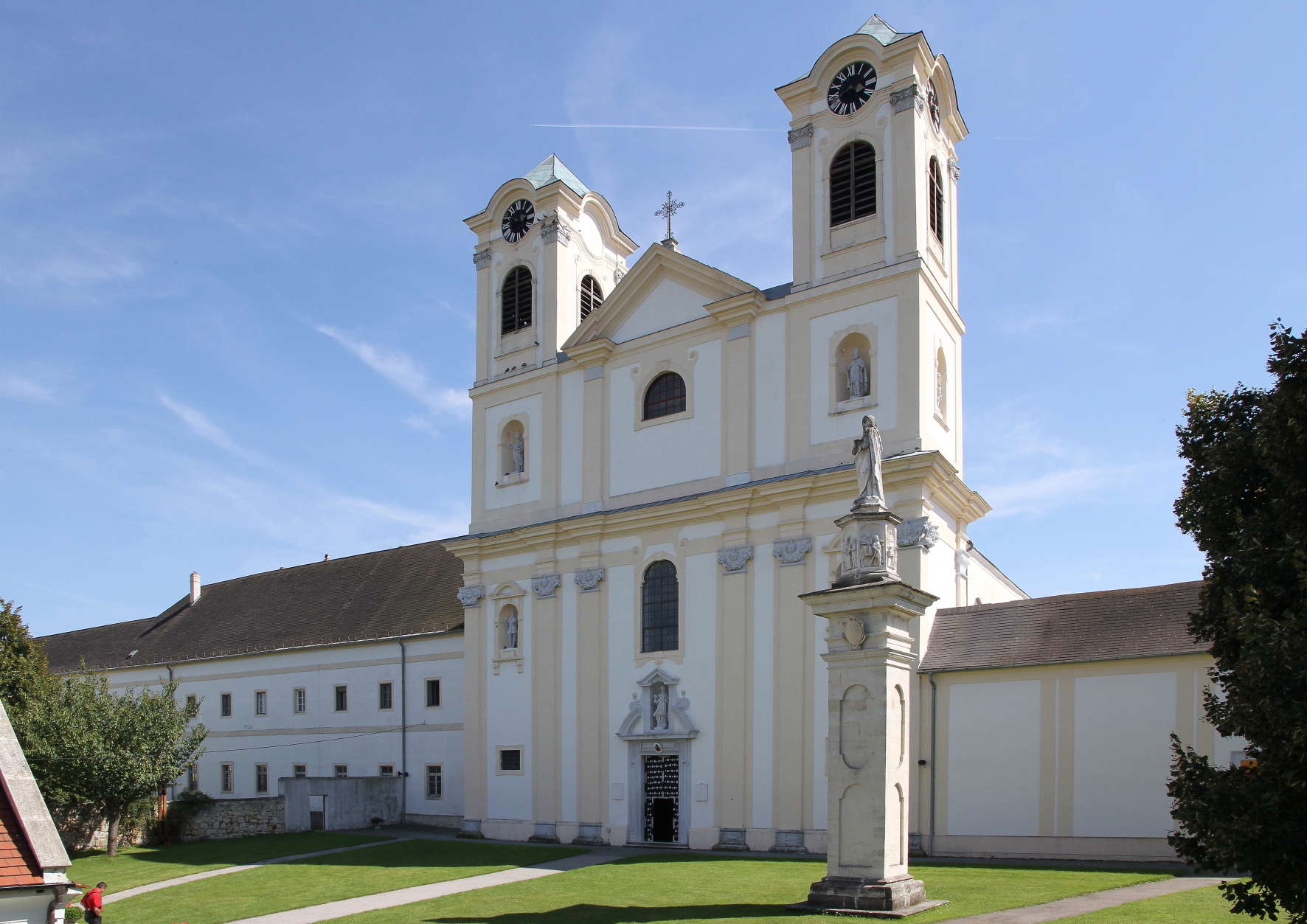 Die Basilika in der burgenländischen Marktgemeinde Loretto. Davor die Mariensäule "Mater-Dolorosa" (um 1700), links das Klostergebäude und rechts die Außenmauer des Kreuzganges.